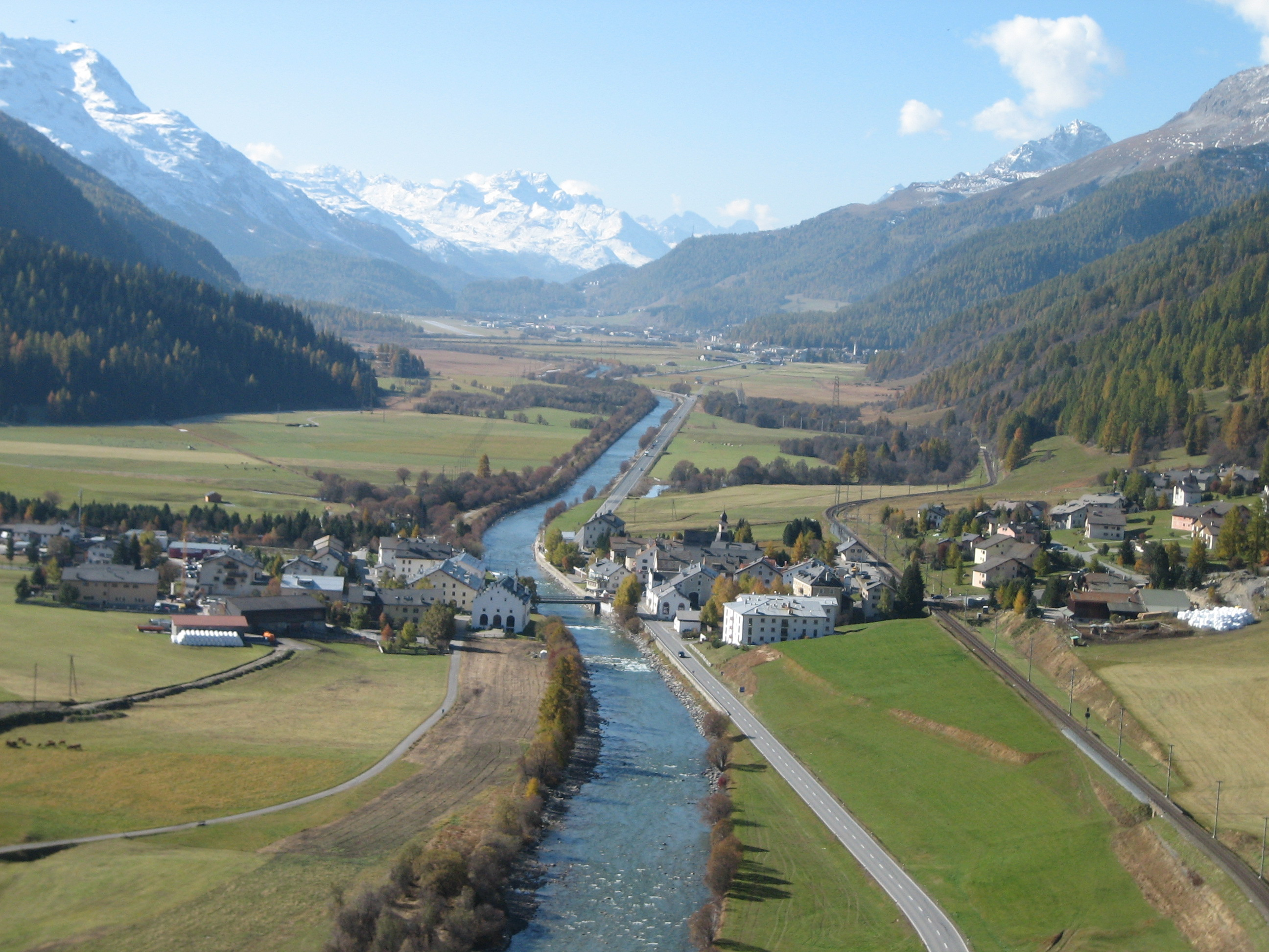 La Punt